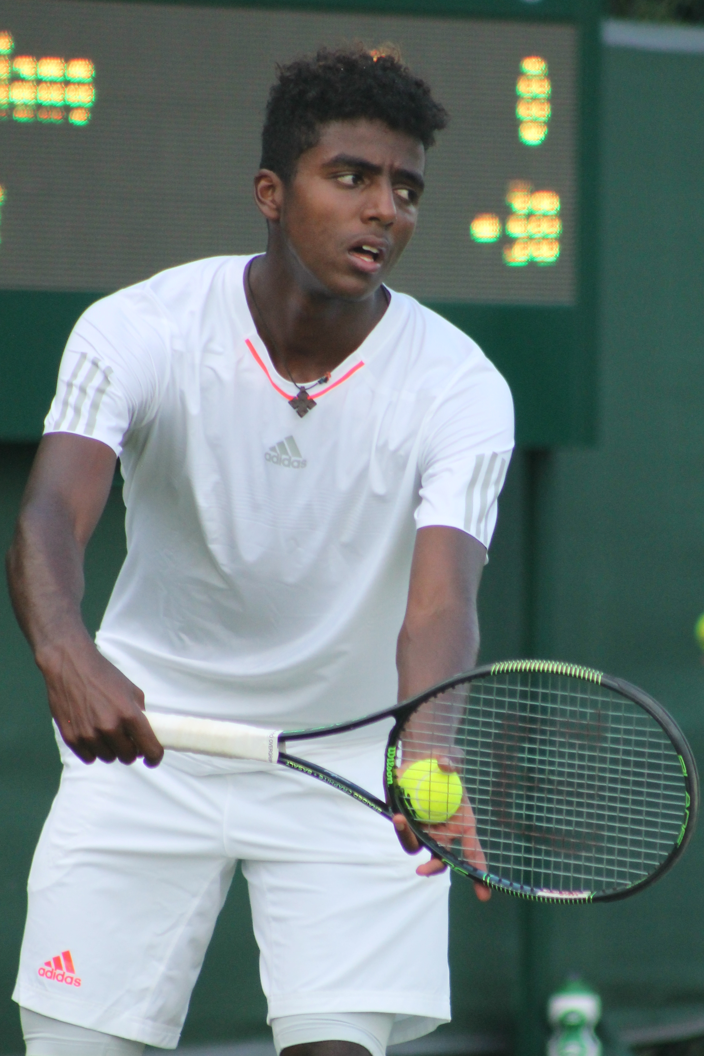 Ymer WMQ15 (12)